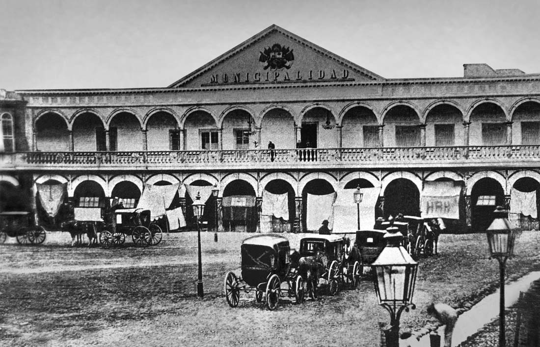 Antigua fachada de la Municipalidad de Lima, en el siglo XIX. En primer plano los coches de pasajeros tirados por caballos estacionados para servir a los personajes oficiales que acudían al Palacio Municipal o al palacio de Gobierno. Foto Archivo Courret. Biblioteca Nacional de Lima.